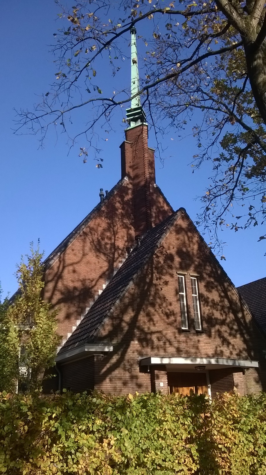 Eikstraatkerk van voren gezien.